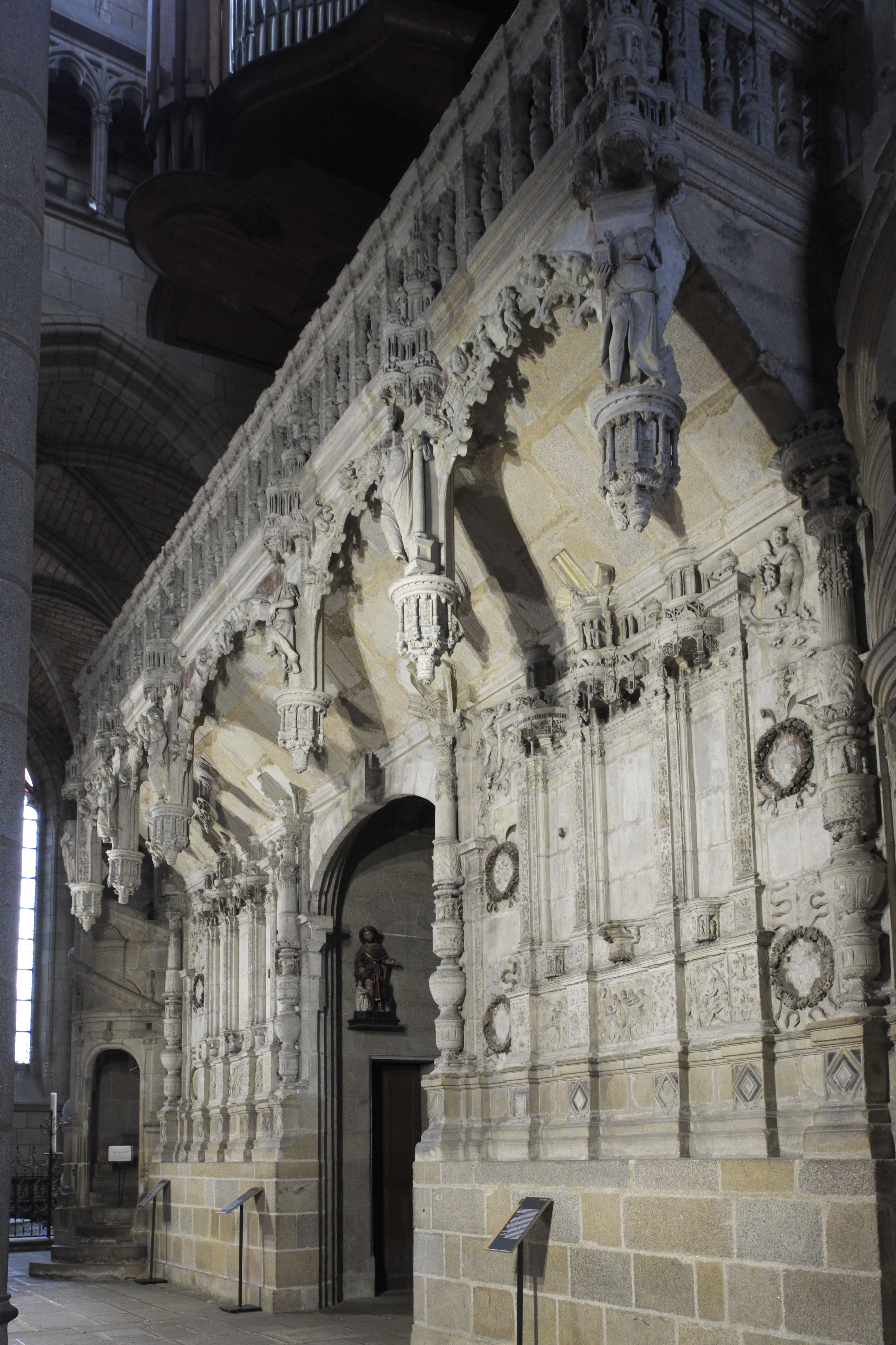 Kathedrale Saint-Étienne in Limoges im Département Haute-Vienne (Nouvelle-Aquitaine/Frankreich), Lettner